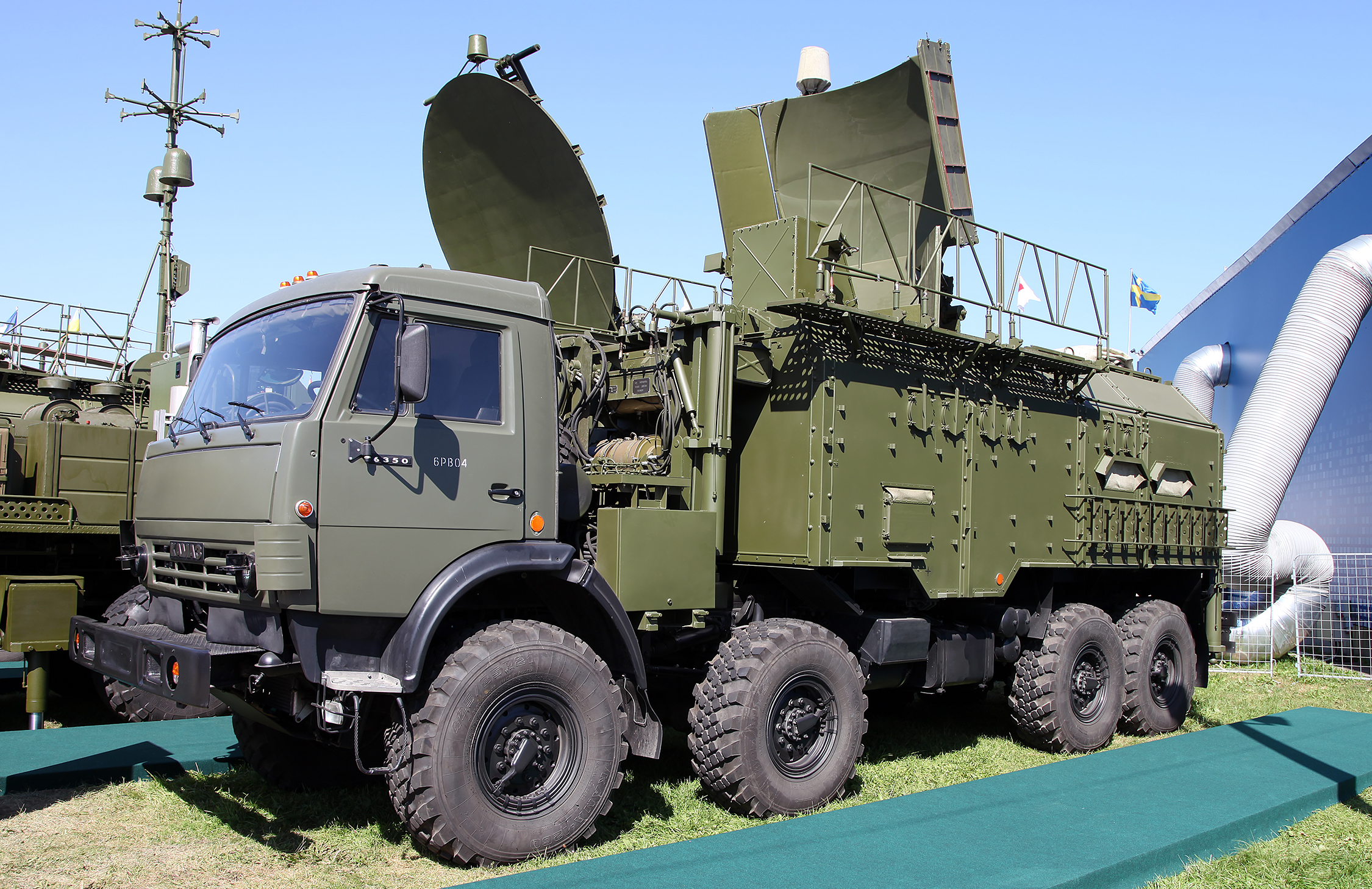 Модуль РЭР 1Л265Э комплекса 1Л267 Москва-1 (EW intelligence vehicle 1L265E from 1L267 Moskva-1 system)